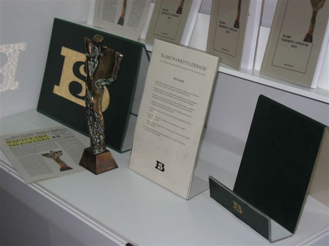 Silesian Library, Śląski Wawrzyn Literacki, Katowice, Poland (3)